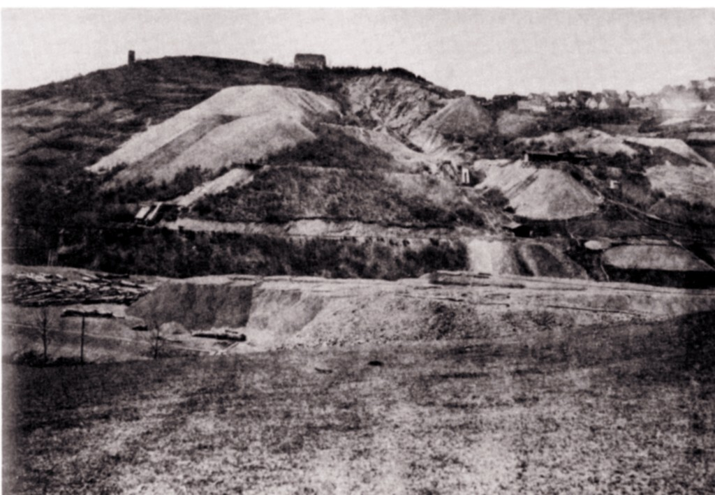 Tagebau der Grube Minna der Stadtberger Gewerkschaft 1872